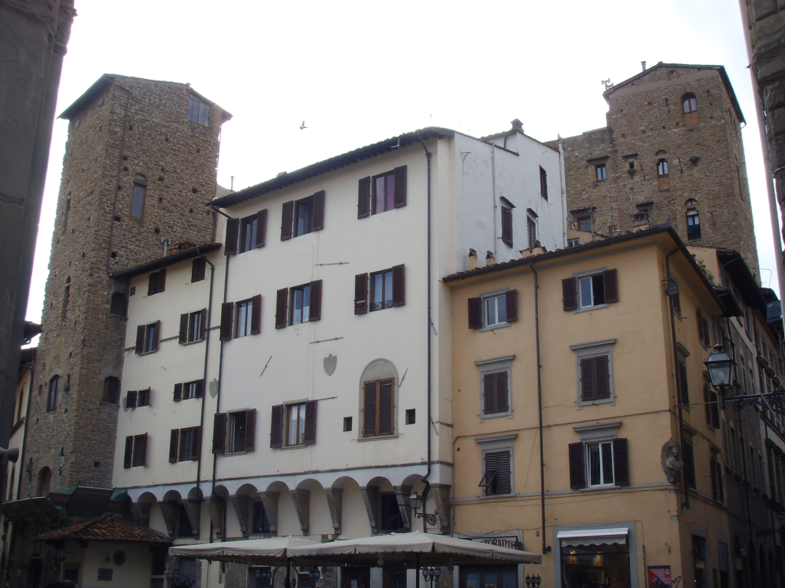 Torri_di_Corso_Donati in Florence, Italy